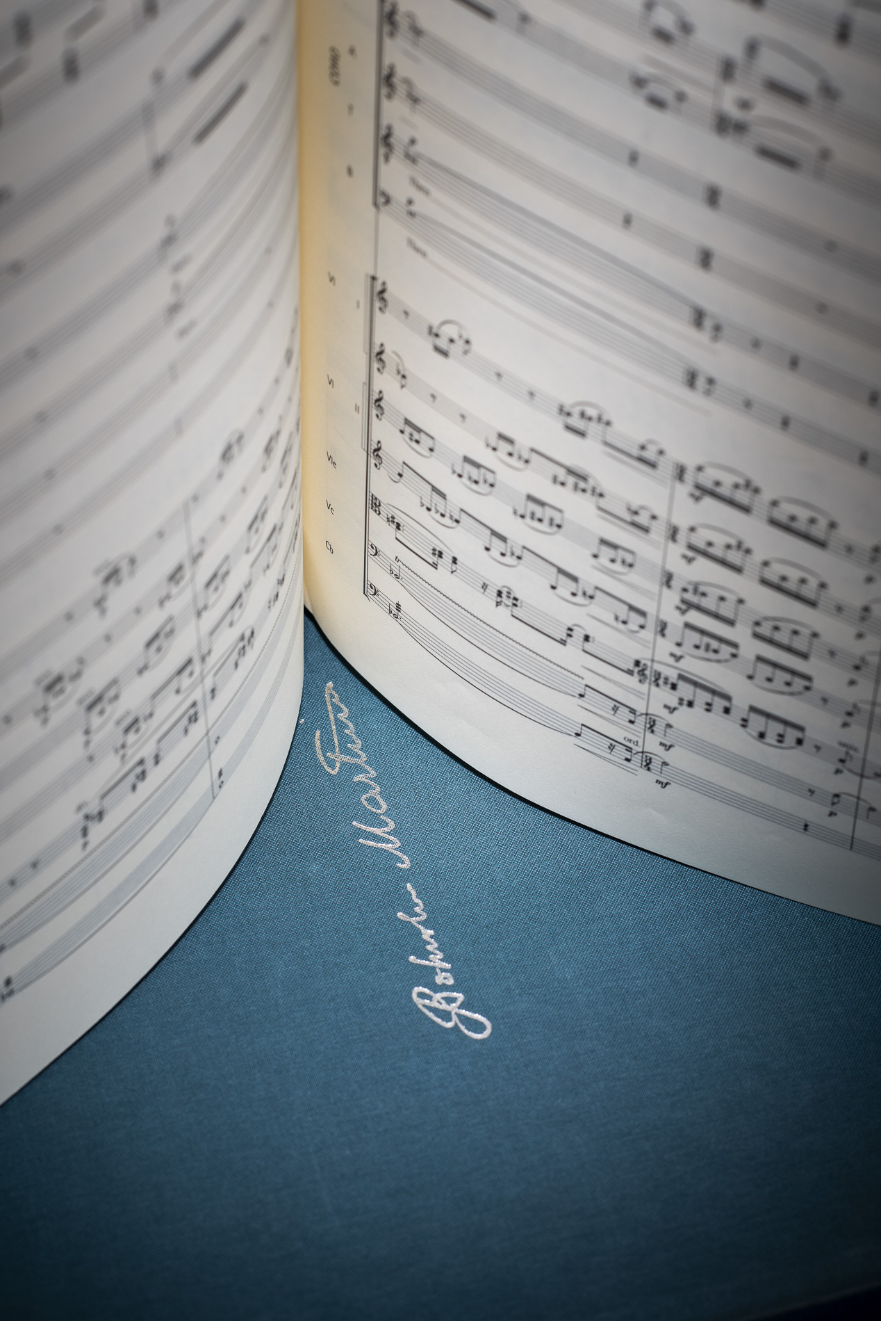 První svazky Souborného vydání děl Bohuslava Martinů (Bohuslav Martinů Complete Edition)